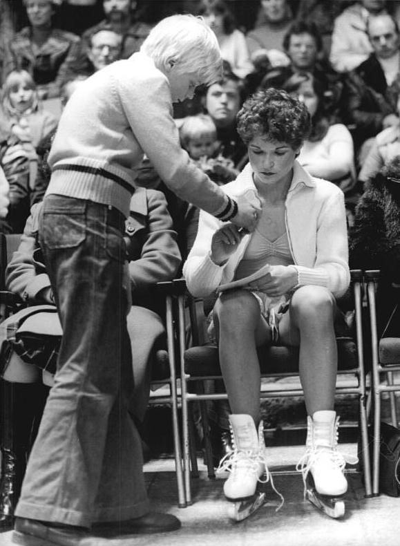 Anett Pötzsch ADN-ZB Rehfeld-17.11.79-str-Berlin: Internationaler Pokal der Blauen Schwerter im Eiskunstlauf. Autogramm der Siegerin: Anett Pötzsch aus Karl-Marx-Stadt wurde in diesem traditionellen Wettkampf ihrer Favoritenrolle klar gerecht. Abgebildete Personen: Pötzsch, Anett: Eiskunstläuferin, DDR